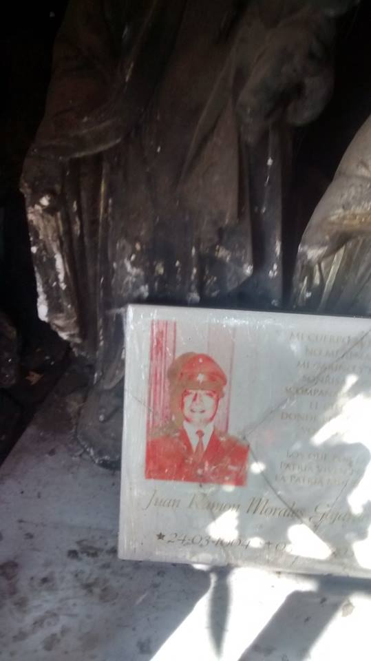 Animita del Carabinero Juan Ramón Morales, muerto en accidente de tránsito en la Calle Santa Amalia con Colombia en la Comuna de La Florida en Chile. Lugar de culto extra católico.